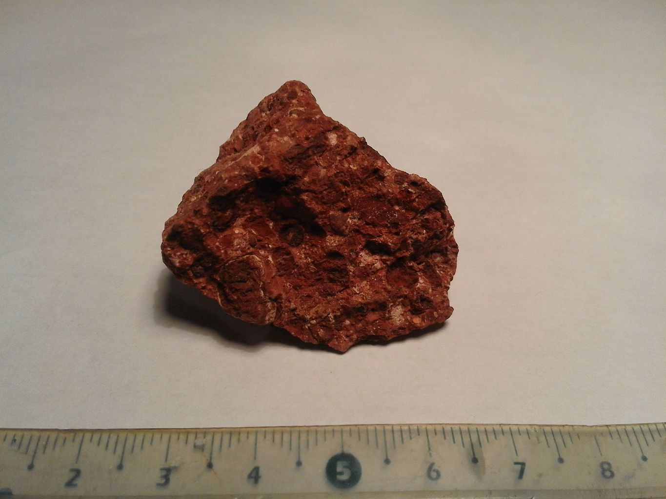 بقايا البوكسيت، الطين الأحمر، الحمأة الحمراء، أو بقايا مصفاة أكسيد الألمنيوم